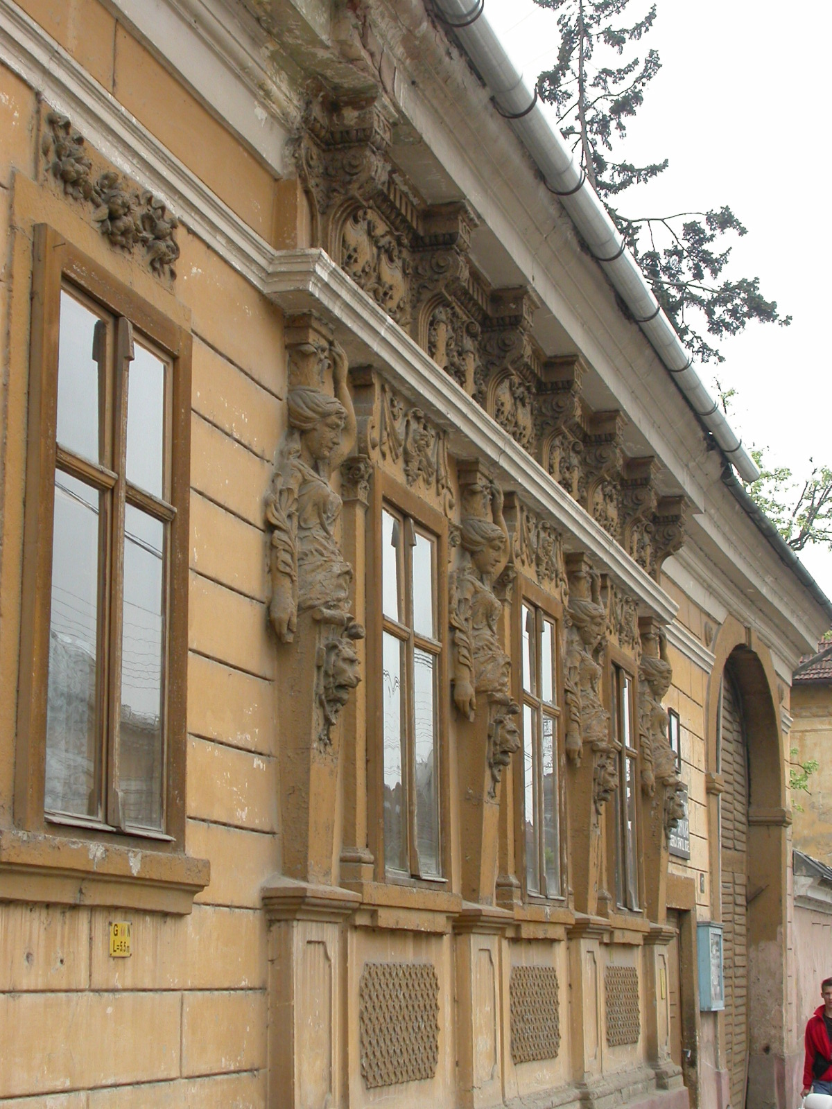 Ansamblul urban "Centrul istoric al orașului Gherla"